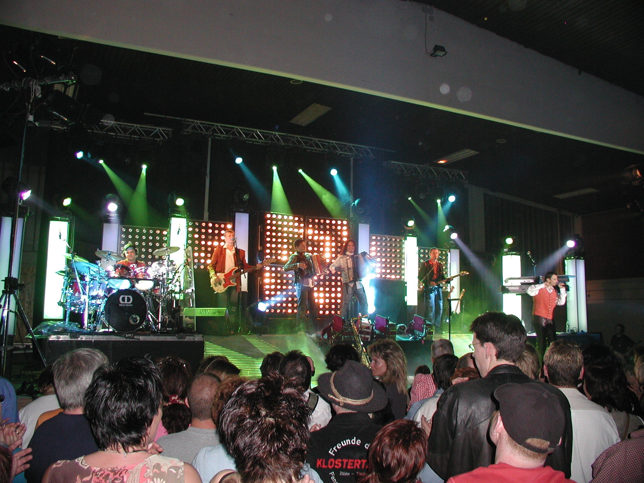 Klostertaler in Freiburg